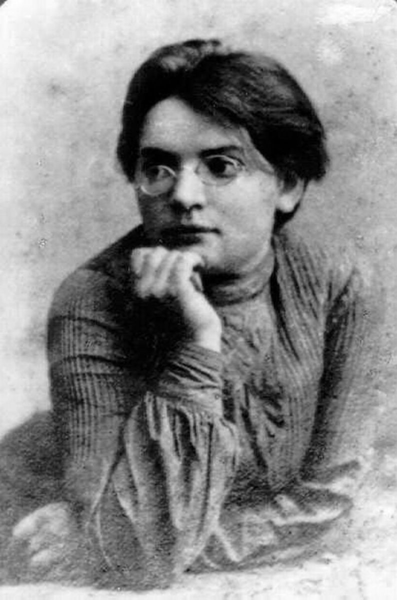 מניה שוחט